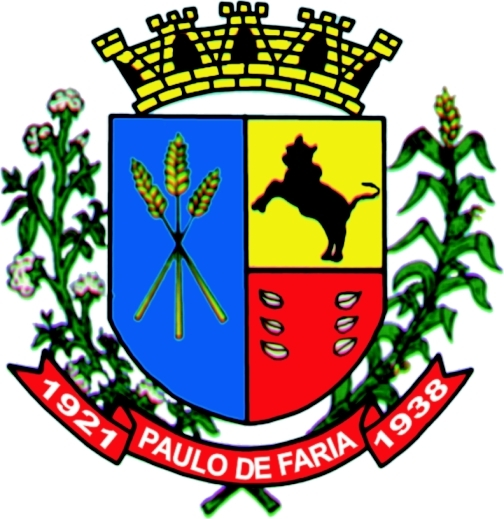 Brasão da cidade de Paulo de Faria, SP